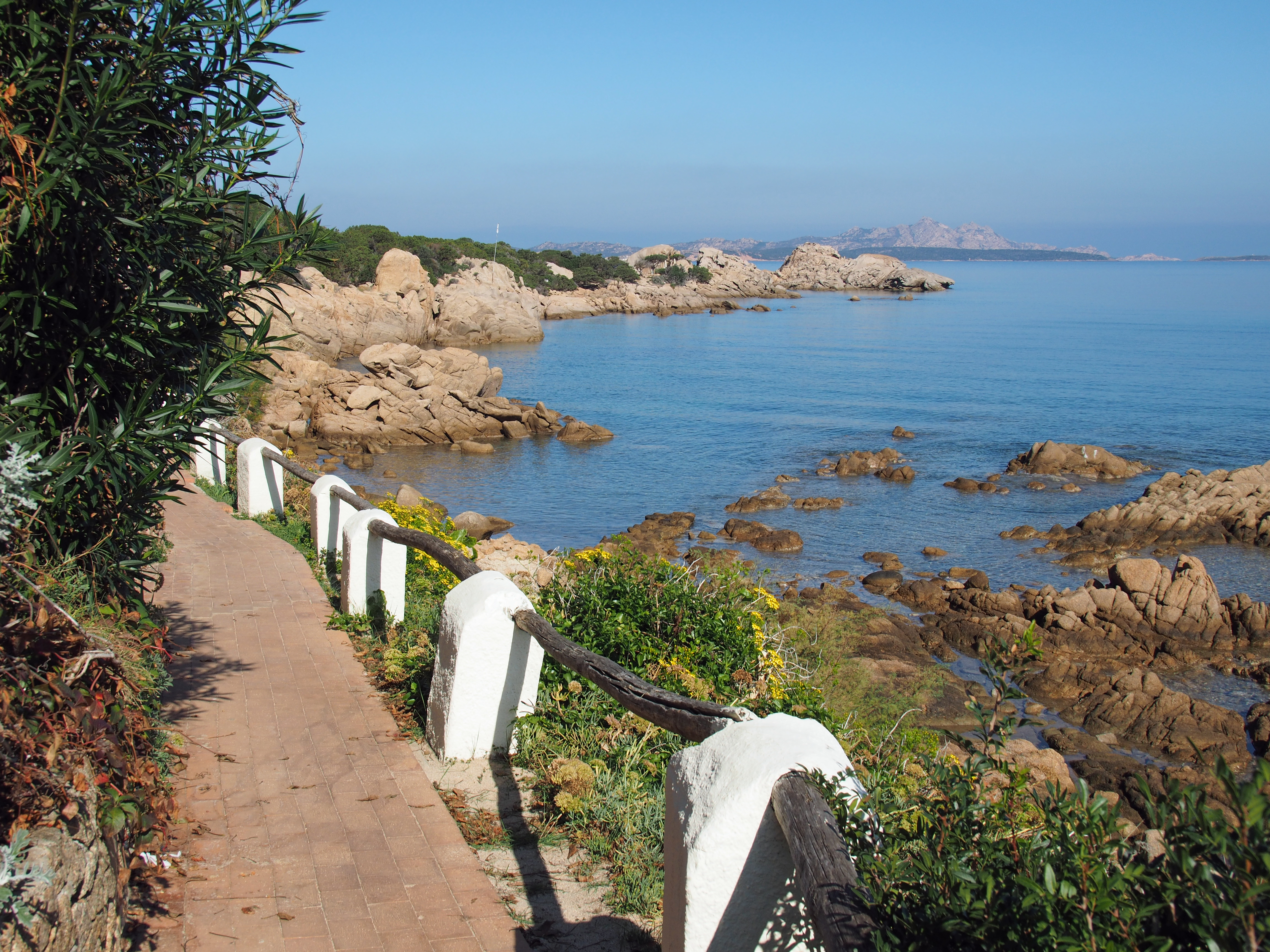 Küste bei Baja Sardinia, Costa Smeralda (Sardinien)